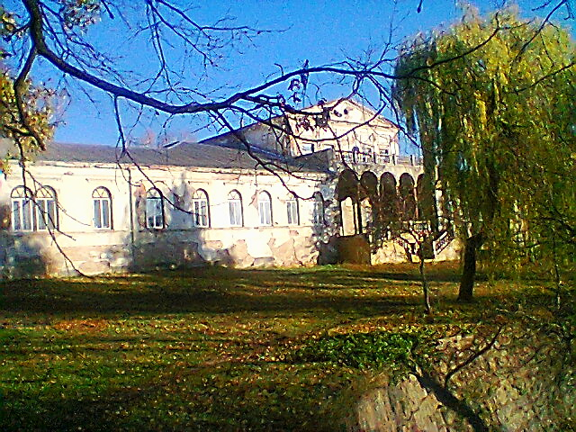 Пам'ятка архітектури 18 ст. - палац Плятерів-Потоцьких-Четвертинських у смт Дашів.